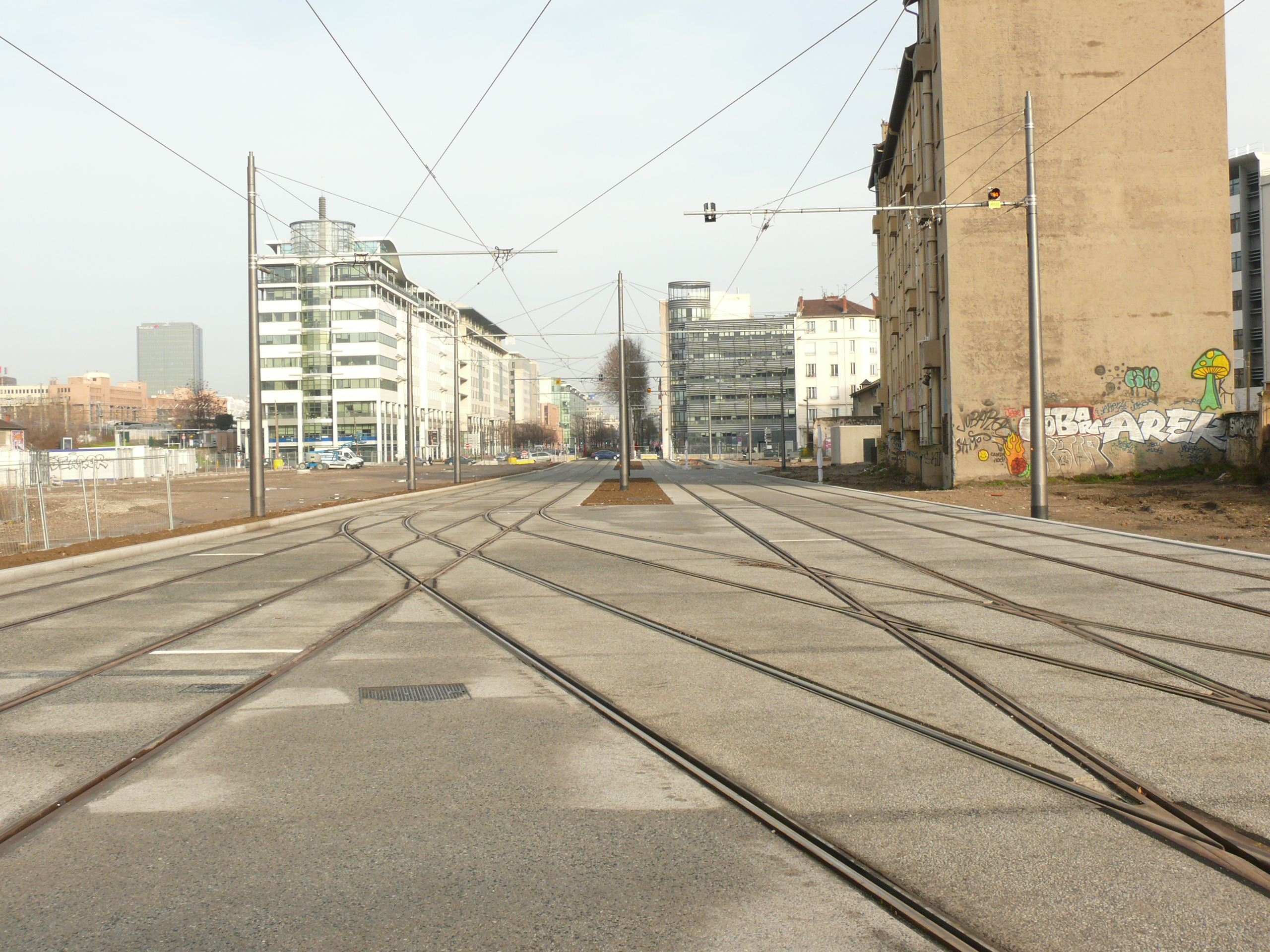 Plan de voie de la station Part-Dieu Sud , en direction de la Station Gare Part-Dieu - Vivier Merle, en décembre 2012